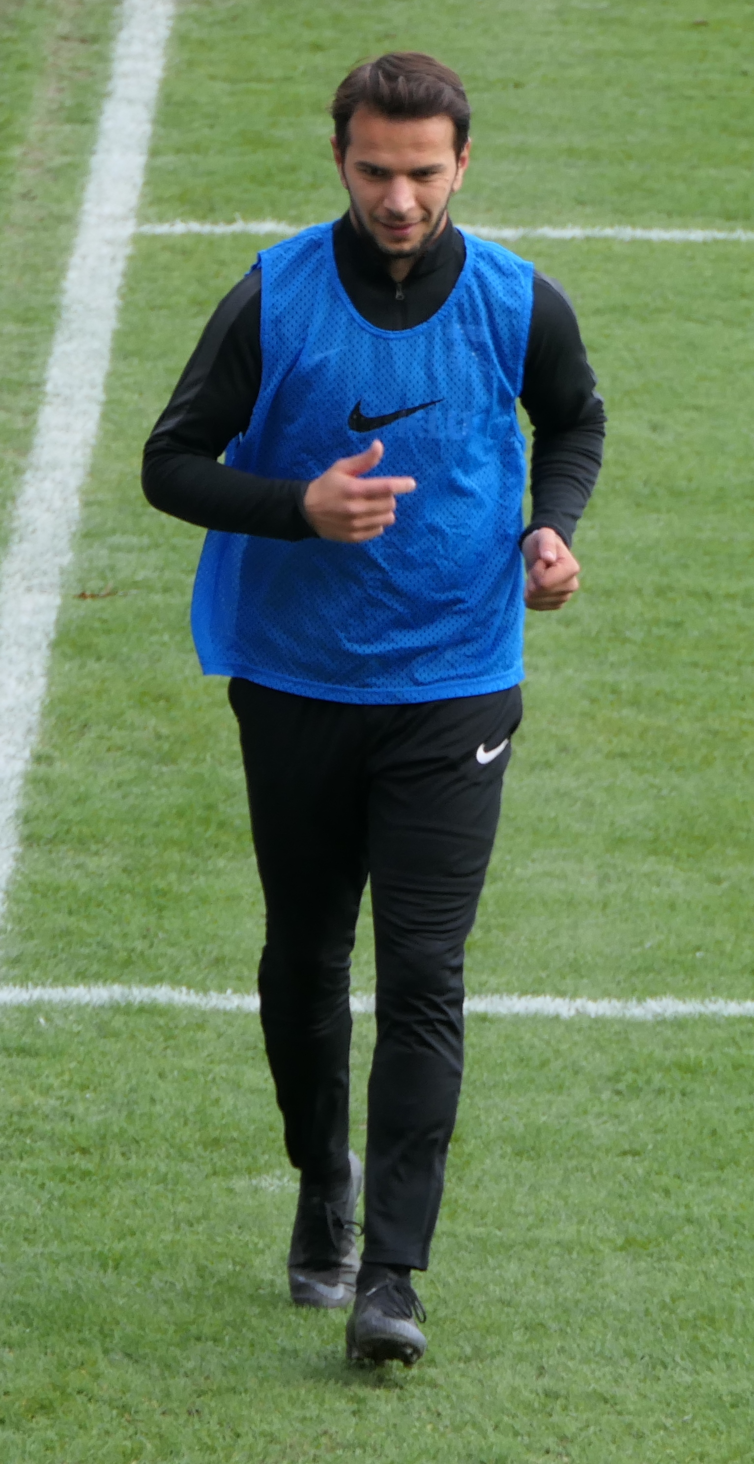 Der Fussballprofi Shqiprim Binakaj von der SG Sonnenhof Großaspach beim Heimspiel gegen Eintracht Braunschweig am 03.11.2018.